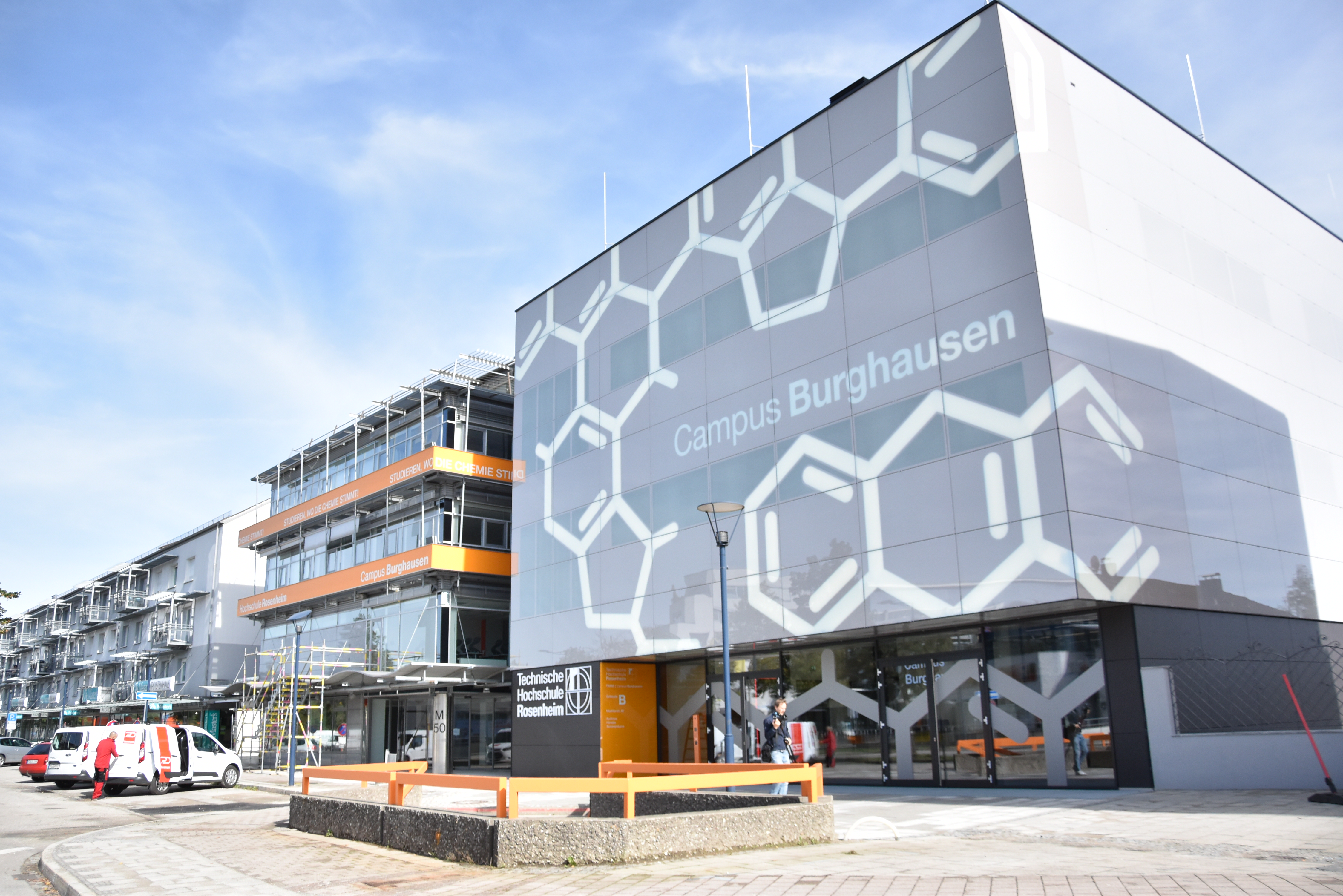 Außenaufnahme des Campus Burghausen der Technischen Hochschule Rosenheim.